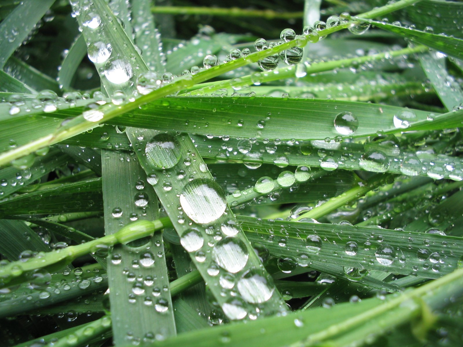 Water drops